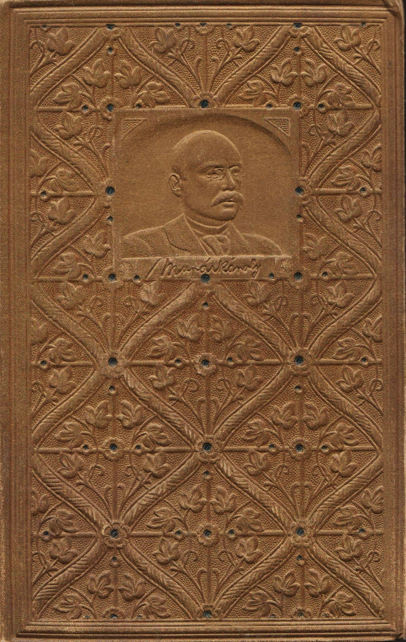 Murai Károly Eljegyzés menyasszony nélkül